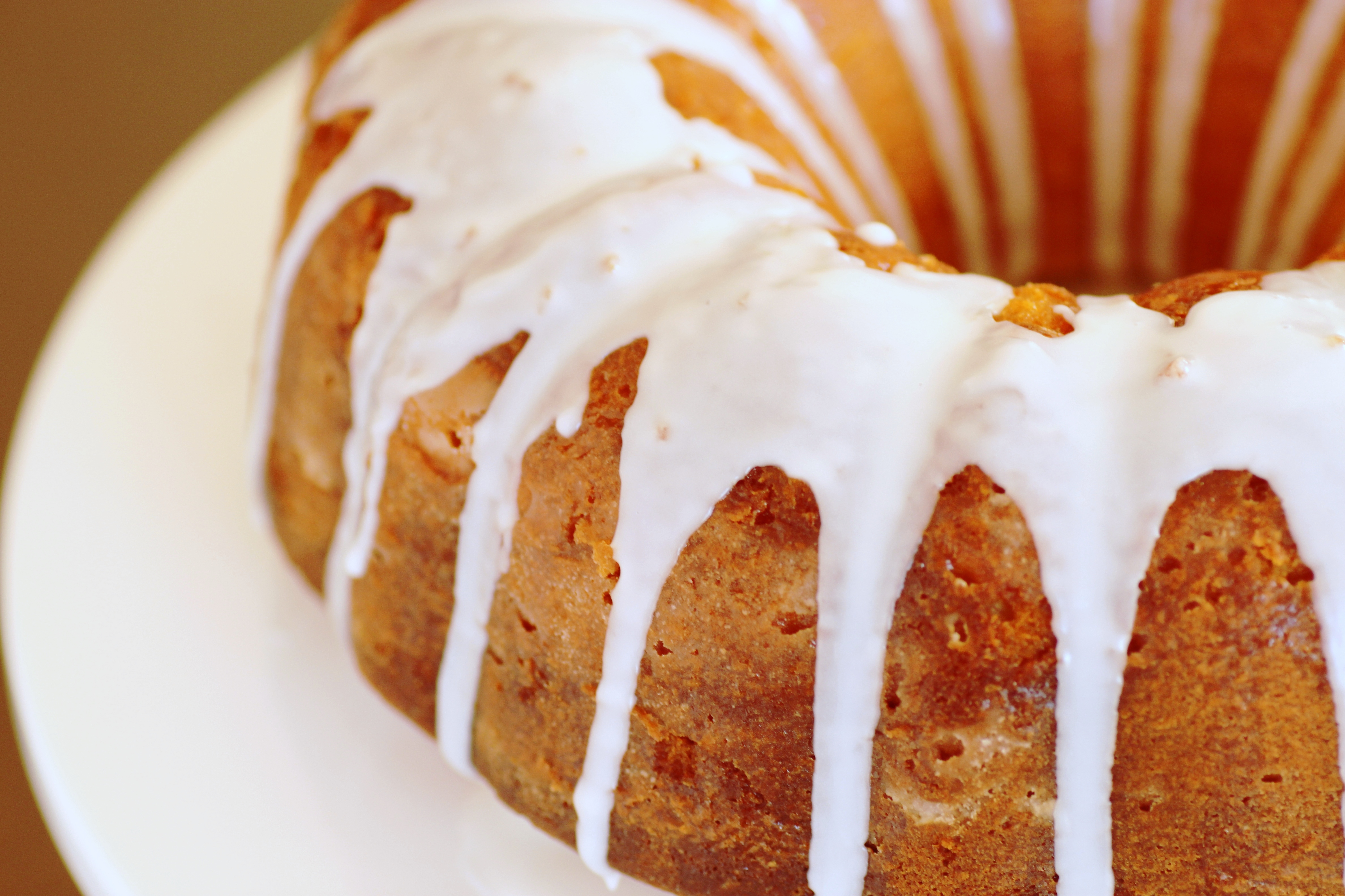 Lemon bundt cake.